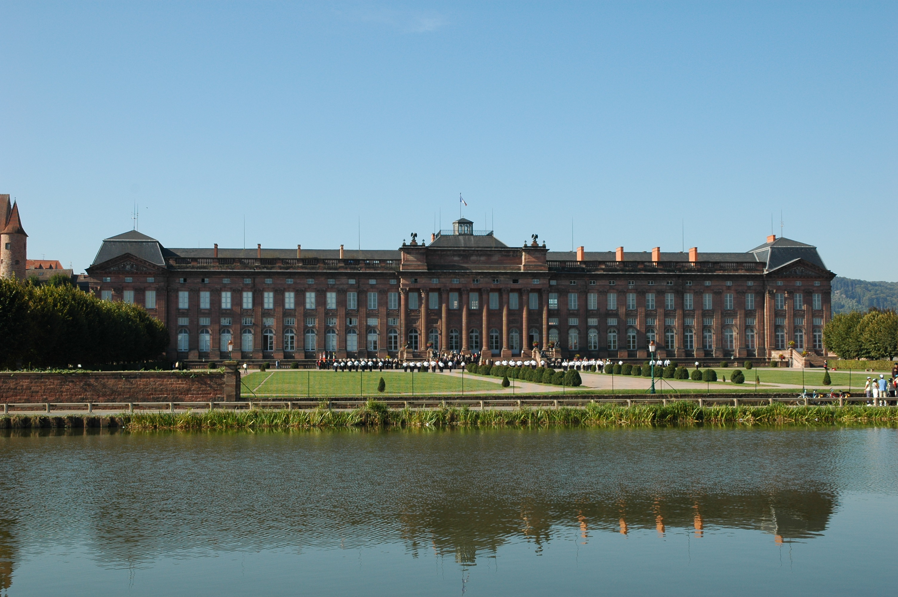 Chateau des Rohan à Saverne